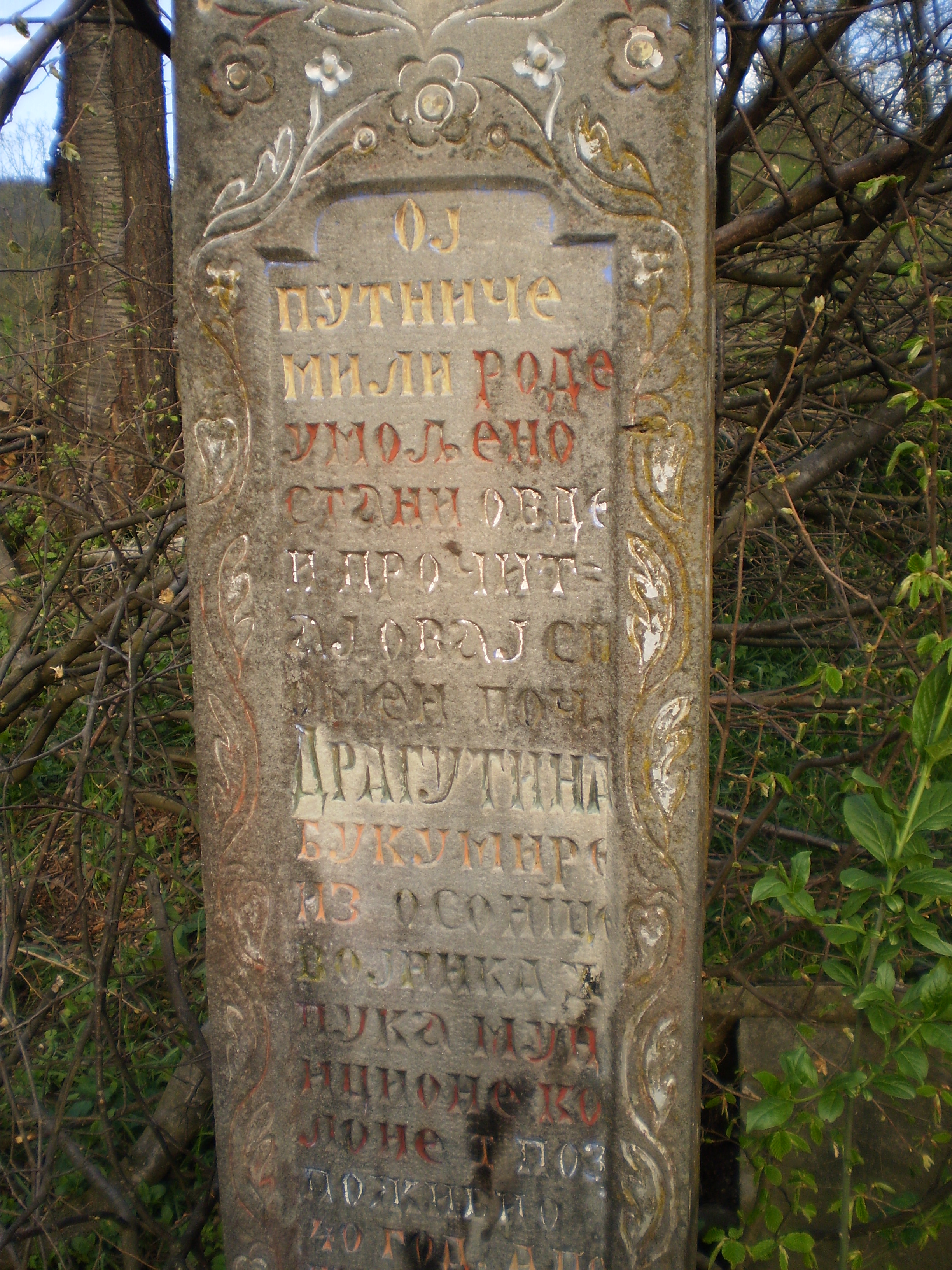 Српски (ћирилица): Споменик (Крајпуташ) Драгутину Букумири, 1915. Селиште